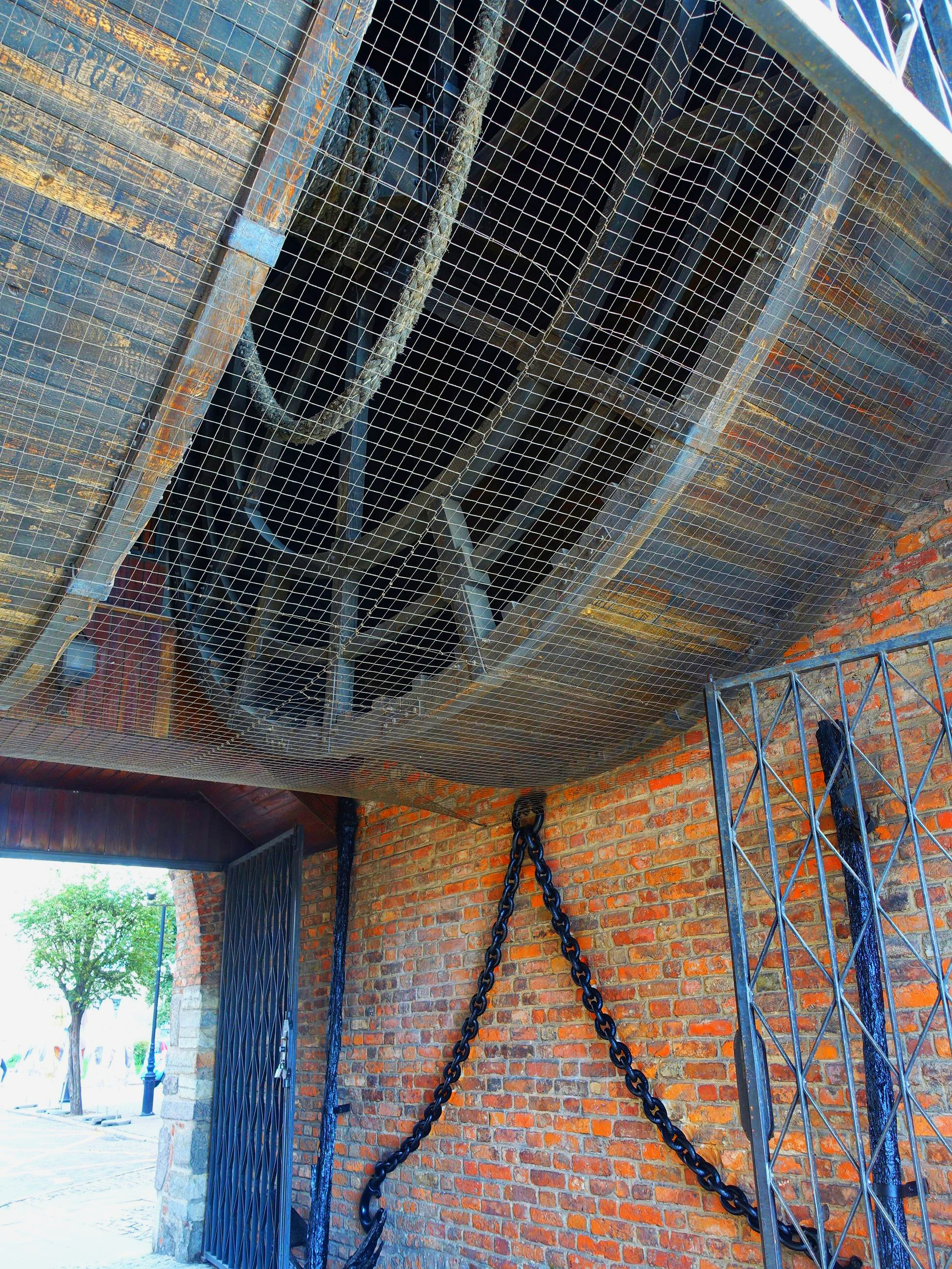 Laufräder über dem Durchgang des Danziger Krantors.